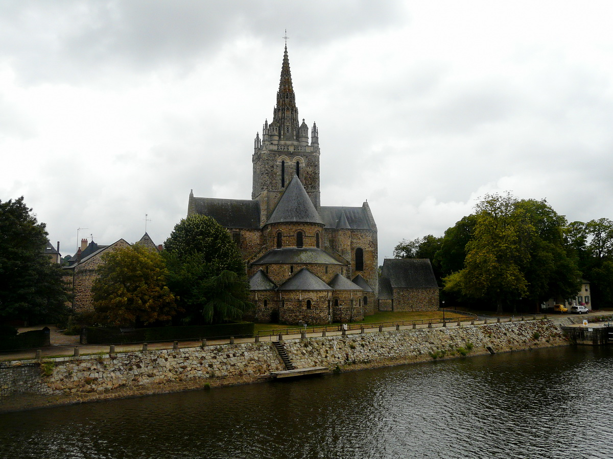 Basilique Notre-Dame d'Avesnières, Laval, France